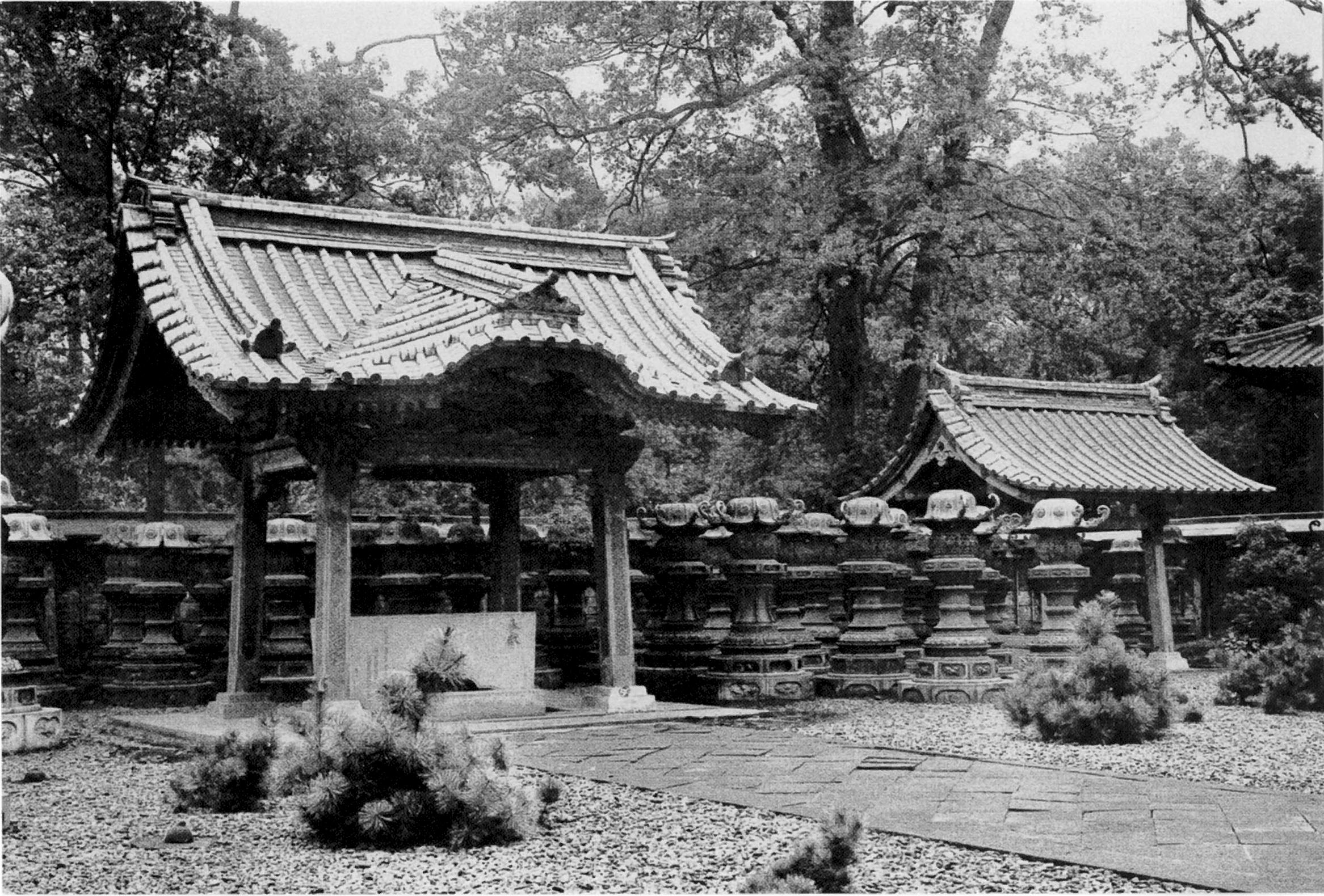 増上寺 有章院殿 (7代家継公) 霊廟 水盤舎及び井戸屋形 1717年造営、1945年焼失。旧 国宝。